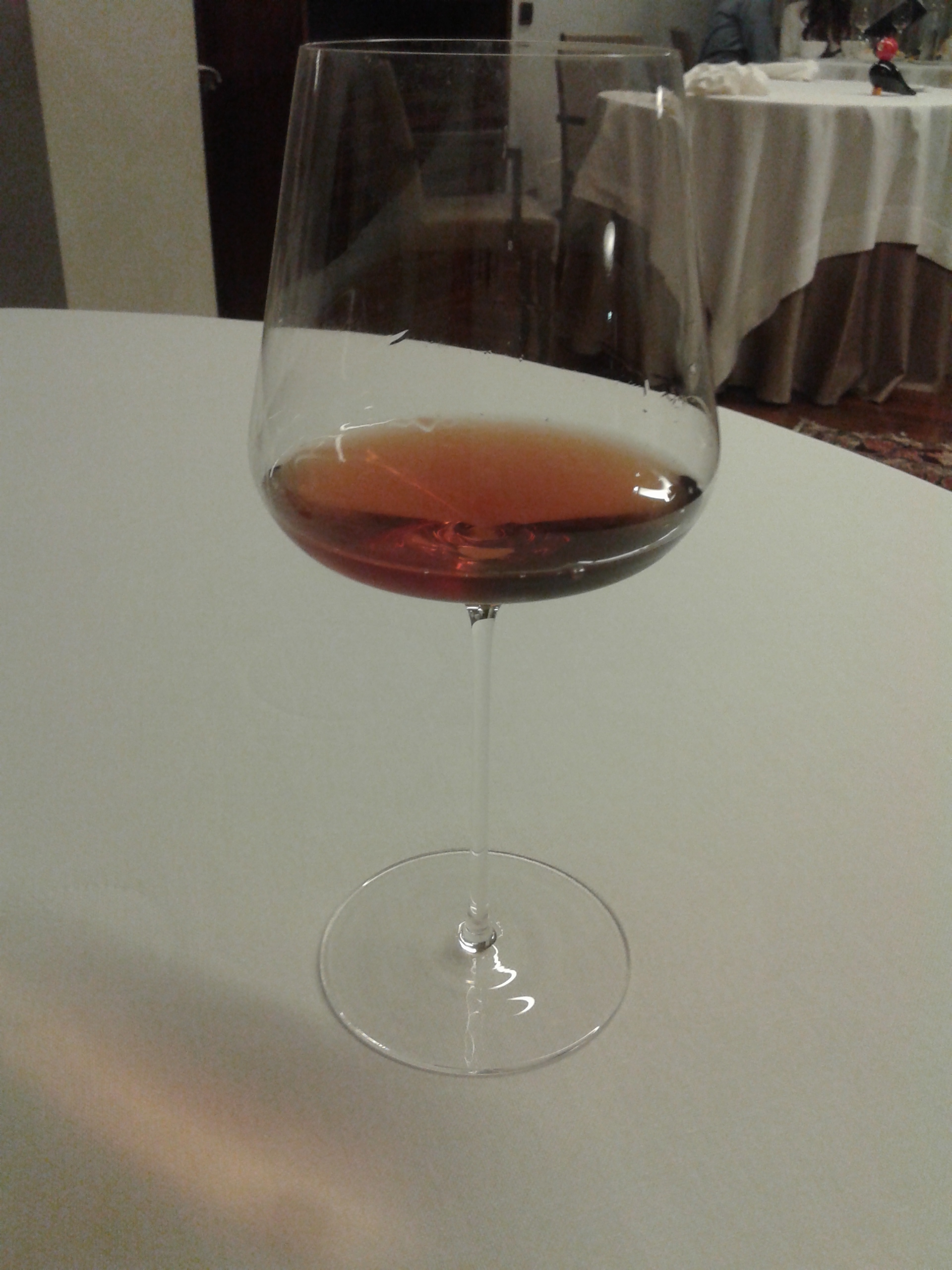 Vino arancione